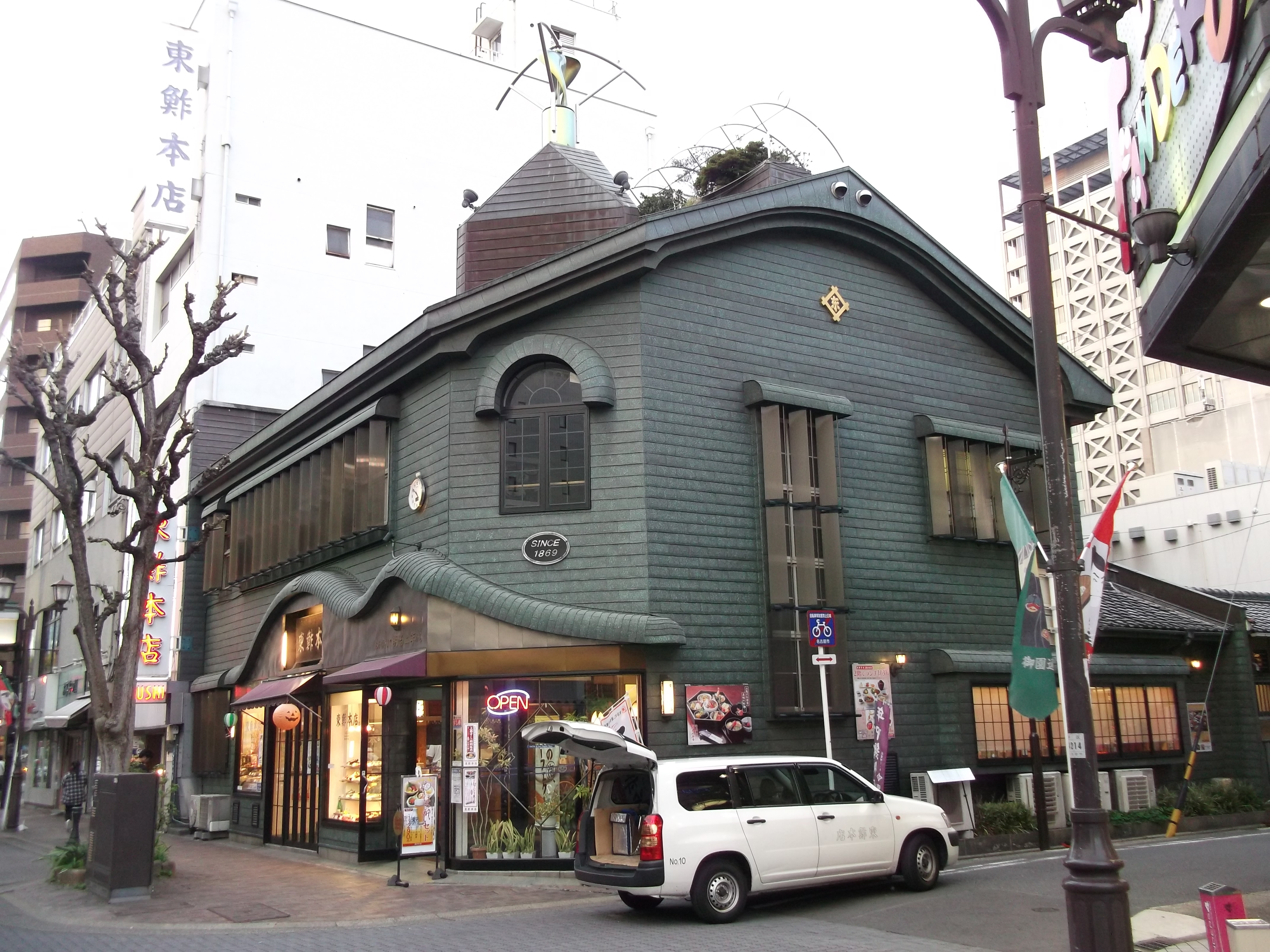 名古屋市中区栄の東鮓本店を南西側より撮影